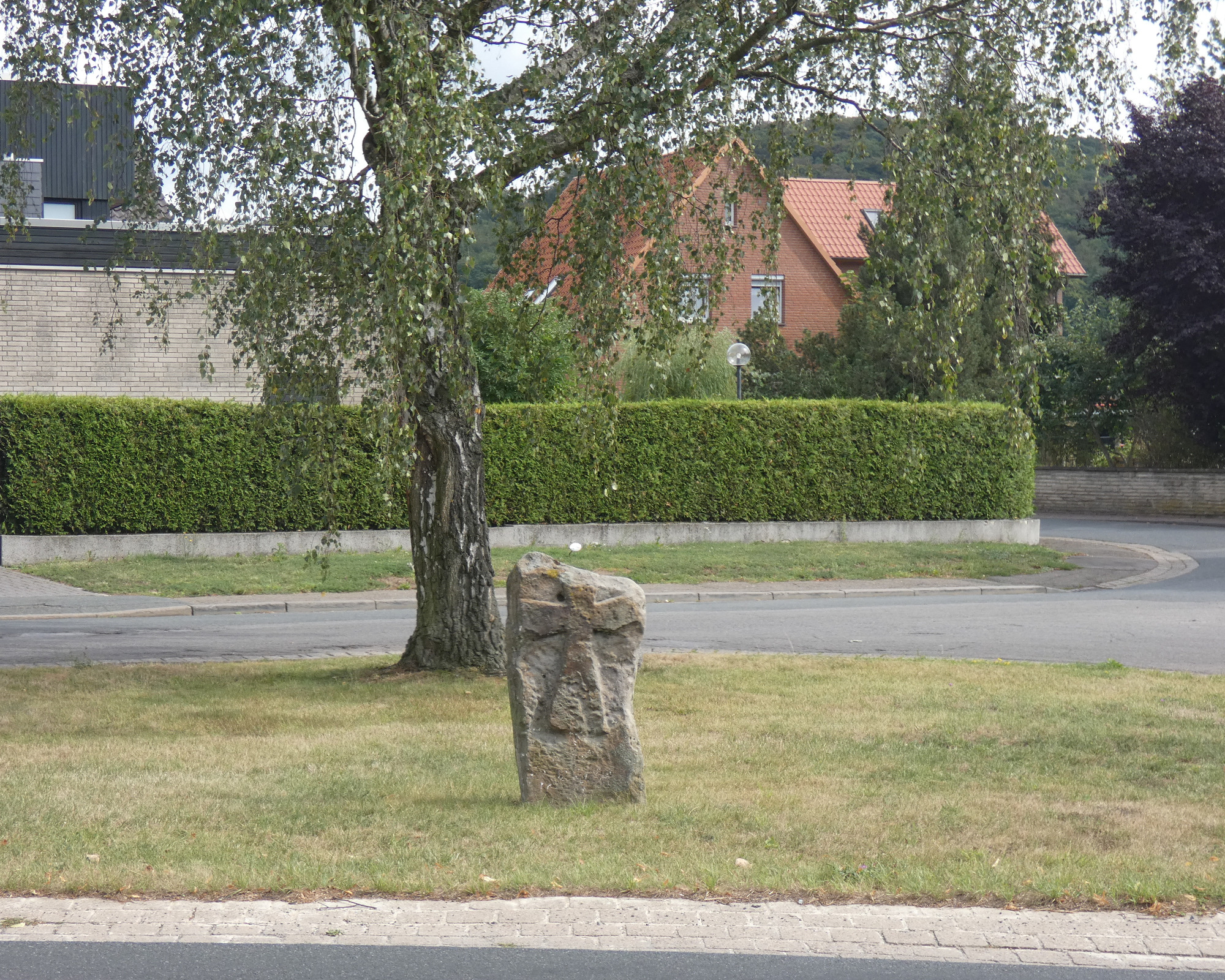 Der sogenannte Schwedenstein ist ein Kreuzstein in Northen, einem Stadtteil von Gehrden in der Region Hannover in Niedersachsen. Er ist einer der wenigen im früheren Landkreis Hannover erhaltenen Kreuzsteine und steht unter Denkmalschutz.